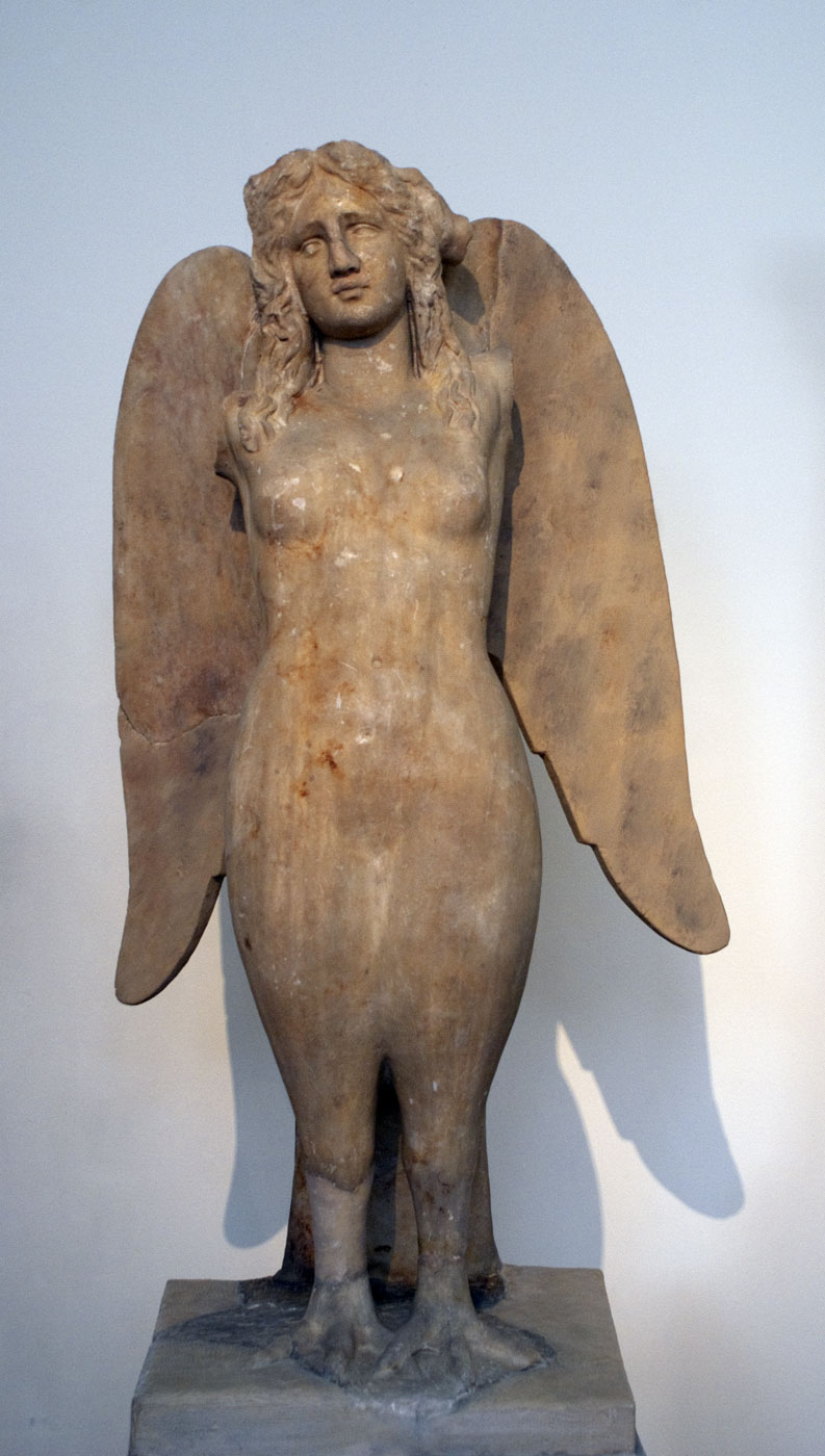 Sirène ornant un monument funéraire (motif fréquent). Vers -330. Musée national archéologique d'Athènes.